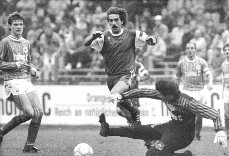 ADN- Wolfgang Kluge-28.11.90- Leipzig: Fußball-Oberliga Nordost- FC Sachsen Leipzig - HFC Chemie 1:3 (0:2) Hier scheitert Lutz Schülbe (2.v.l.) noch am Leipziger Torwart Rene Müller, wenige Minuten später jedoch erzielte er das entscheidende dritte Tor für den HFC Chemie.